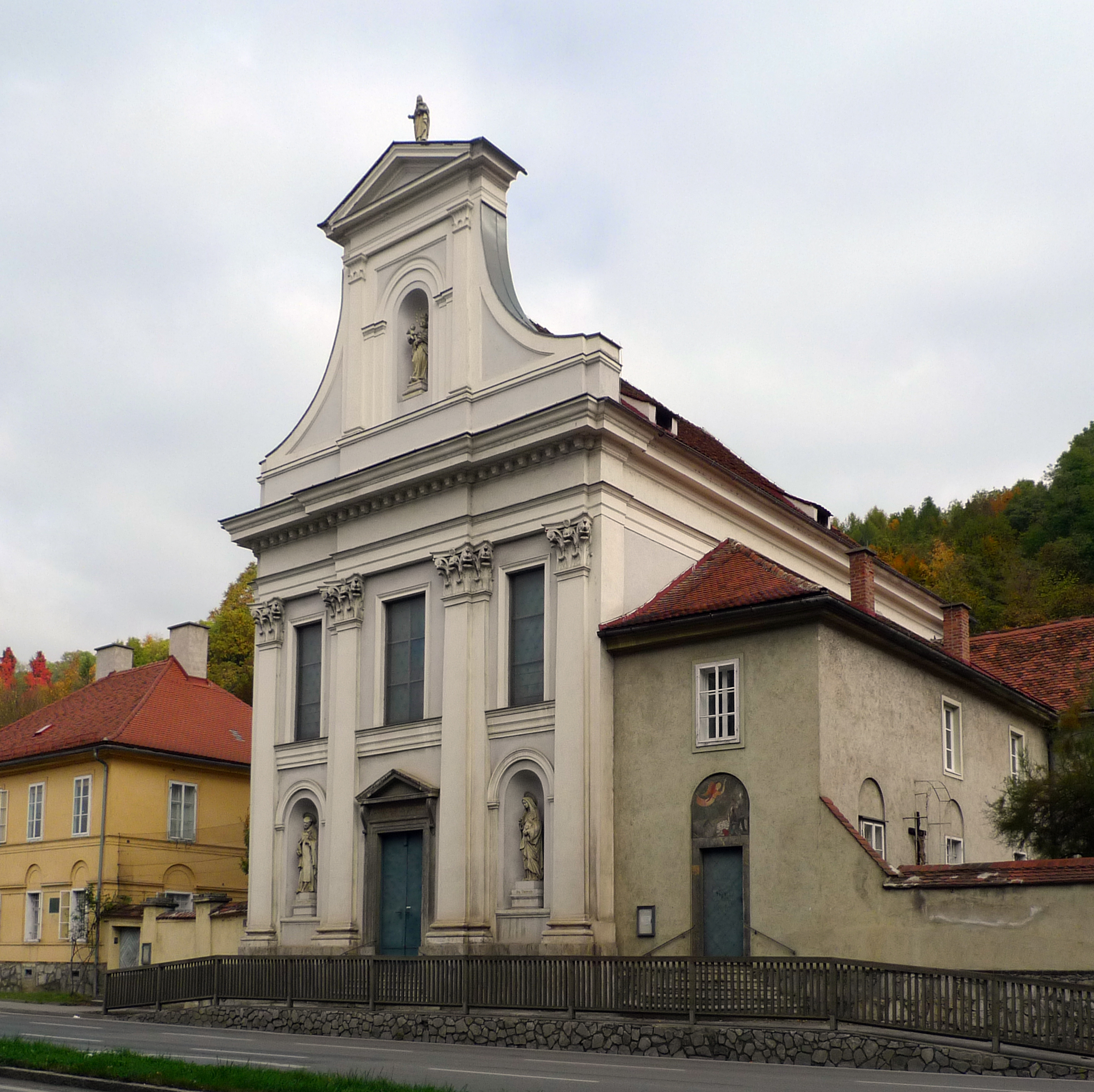 Karmelitinnenkloster mit Einfahrtstor, Ummauerung und Gruftkapelle